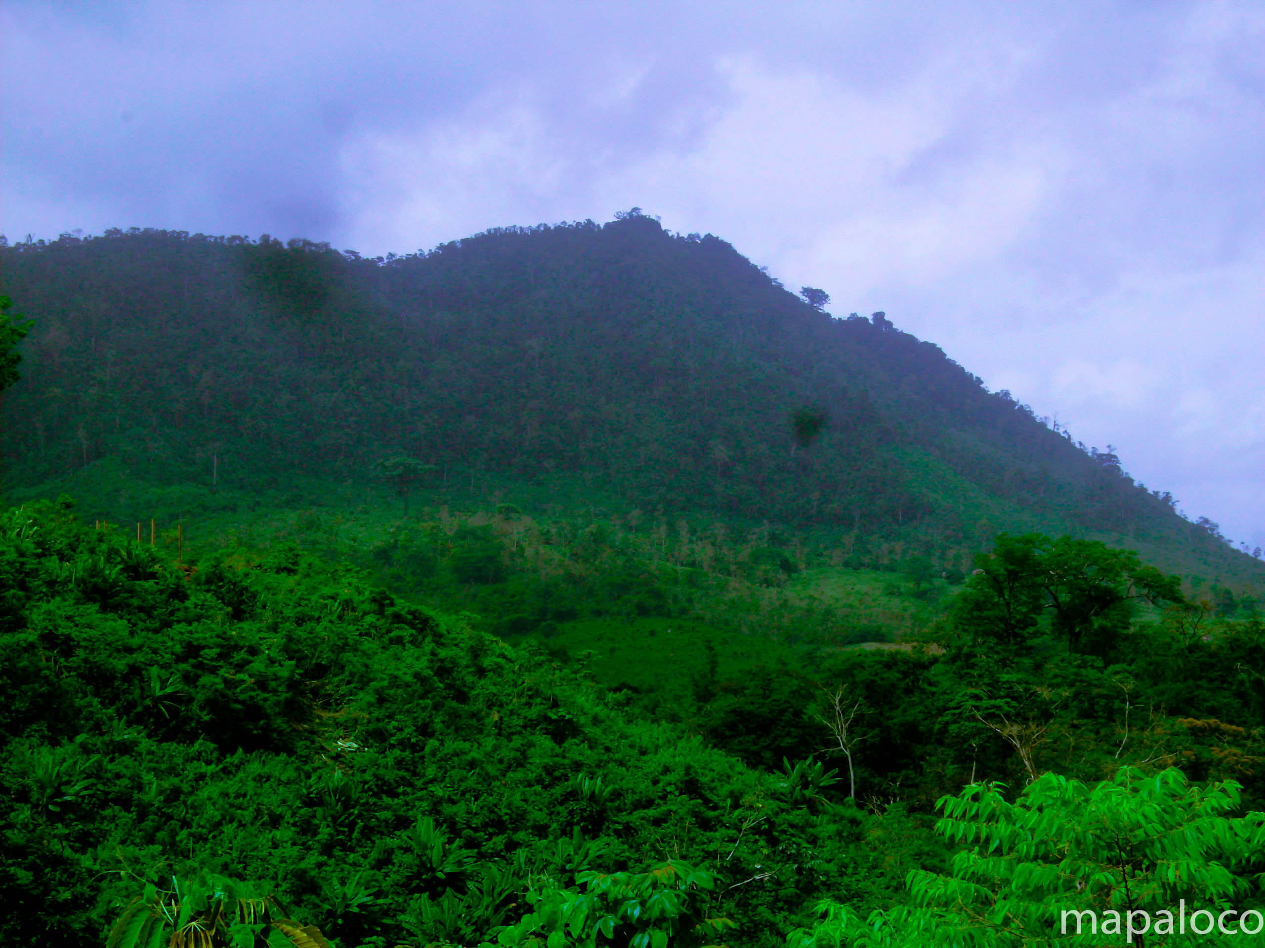 Cerro Kaskon, Siuna, RAAN. Nic.